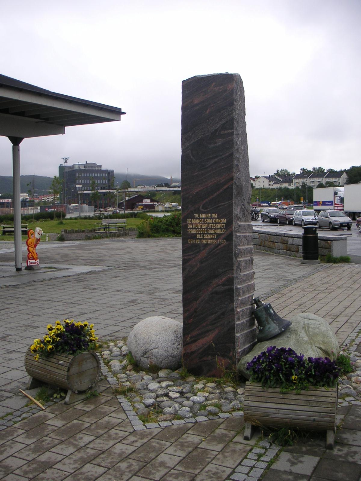 Denkmal Untergang Prinzesse Ragnhild in Bodö